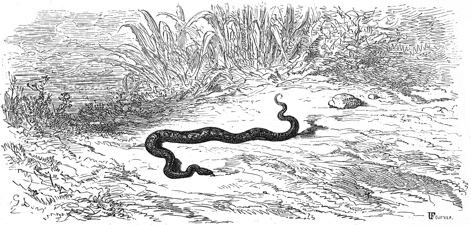 grafika z książki PL Bajki, Jean de La Fontaine, nakładem i drukiem Jana Noskowskiego, Warszawa 1876